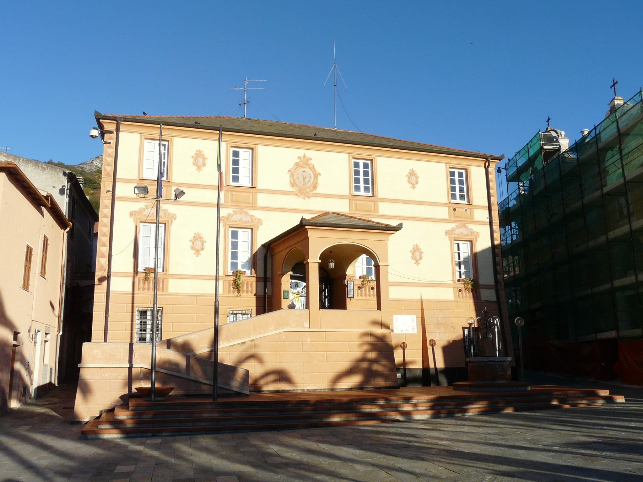 Municipio di Boissano, Liguria, Italia